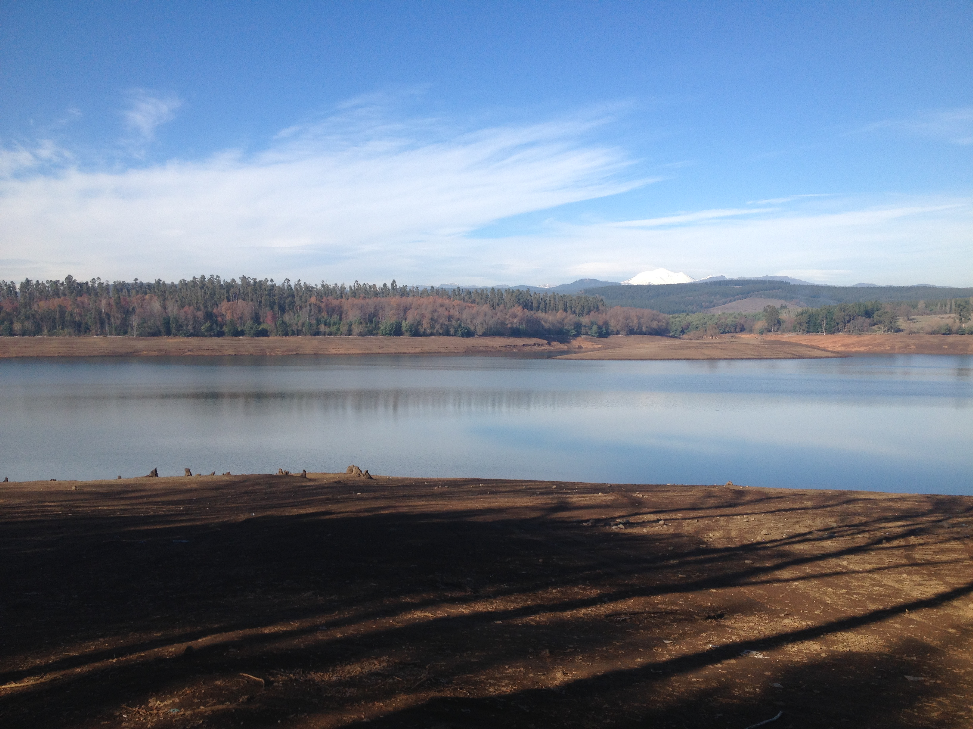 Vista del Embalse Coihueco desde ribera oeste, donde se emplaza su muro auxiliar.